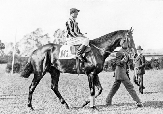 Herold mit Jockey Julius Rastenberger auf dem Weg zum Start des Deutschen Derbys 1920